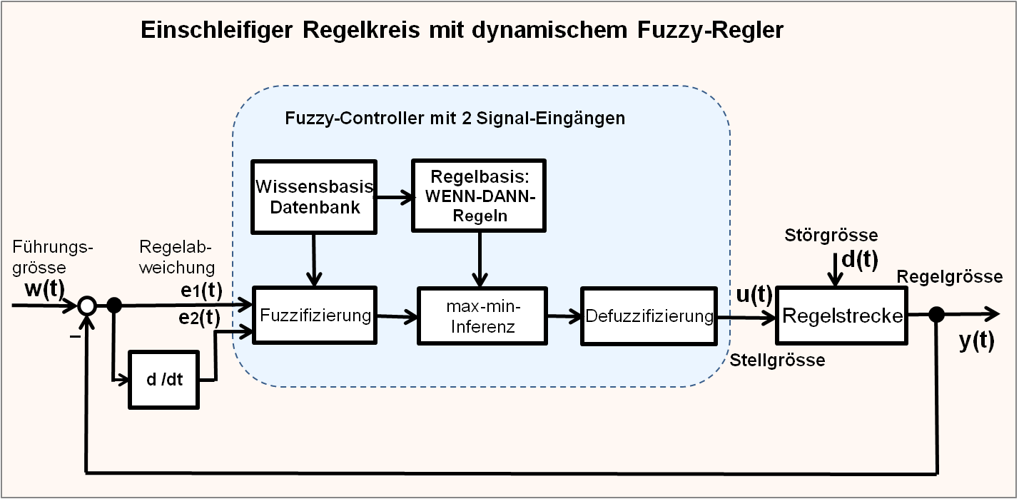 Blockschaltbild eines Regelkreises mit einem Fuzzy-PD-Regler mit 2 Signaleingängen.